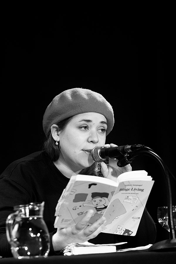 Stefanie Sargnagel, Düsseldorf, ZAKK, 14.März 2016, Lesung aus „Fitness“